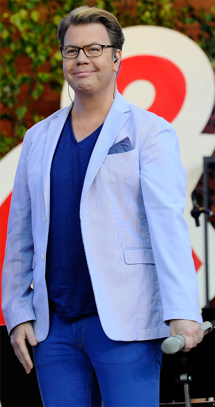 Stephan Lundin